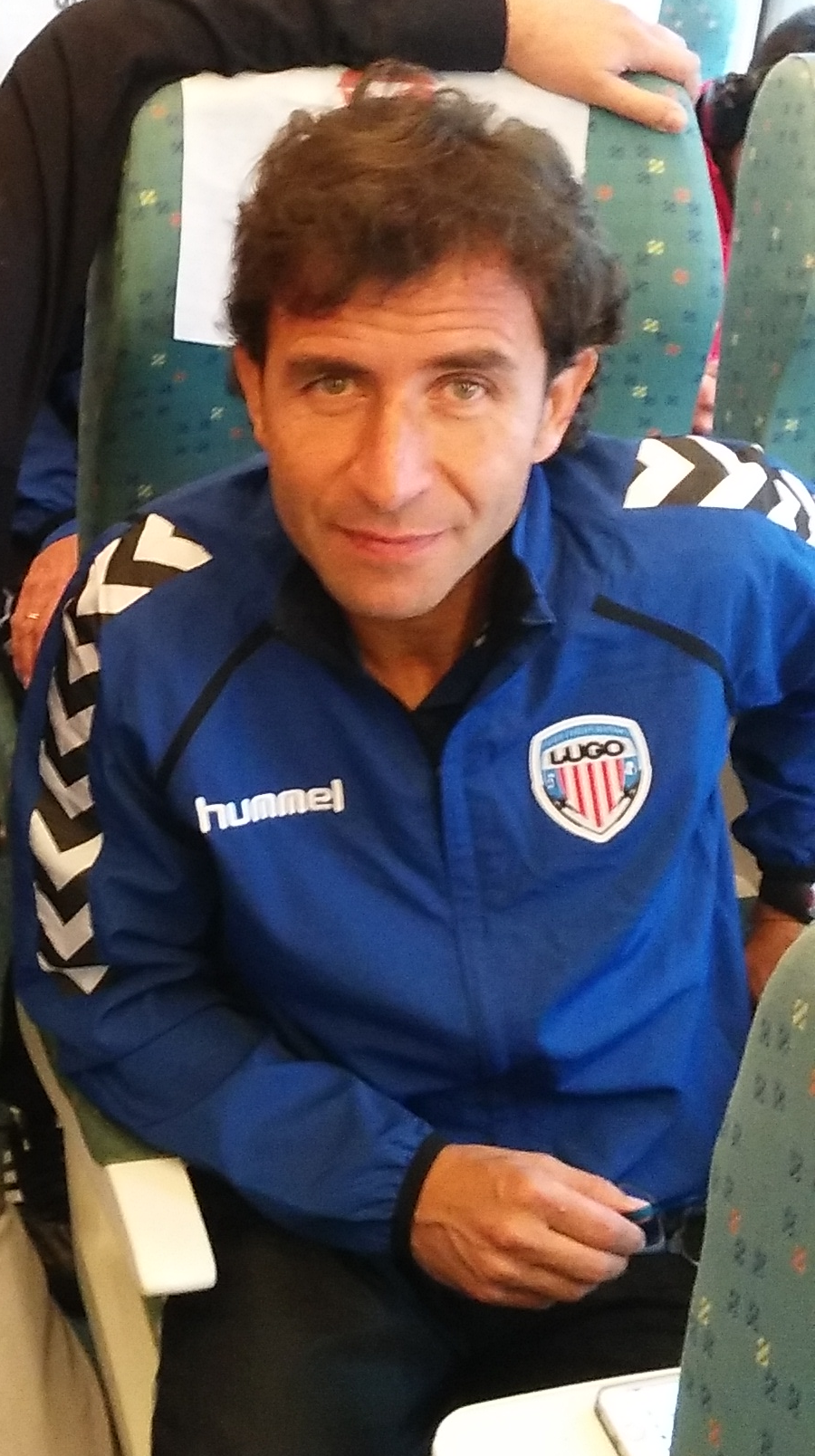 Luis Milla, futbolista